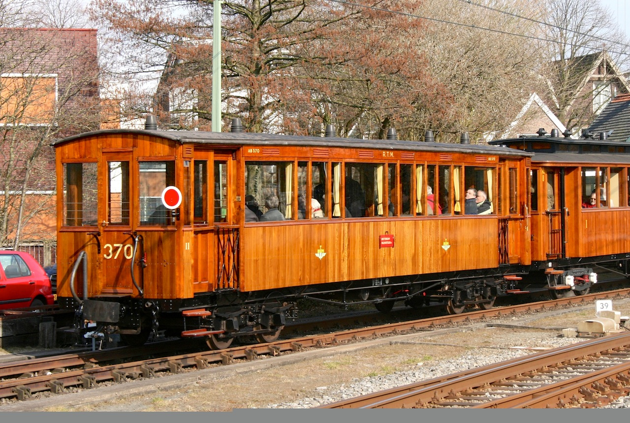 SHM rijtuig AB 370 van de Rotterdamse Tramweg Maatschappij, te Hoorn; 29 september 2013. Foto: Erik Swierstra.